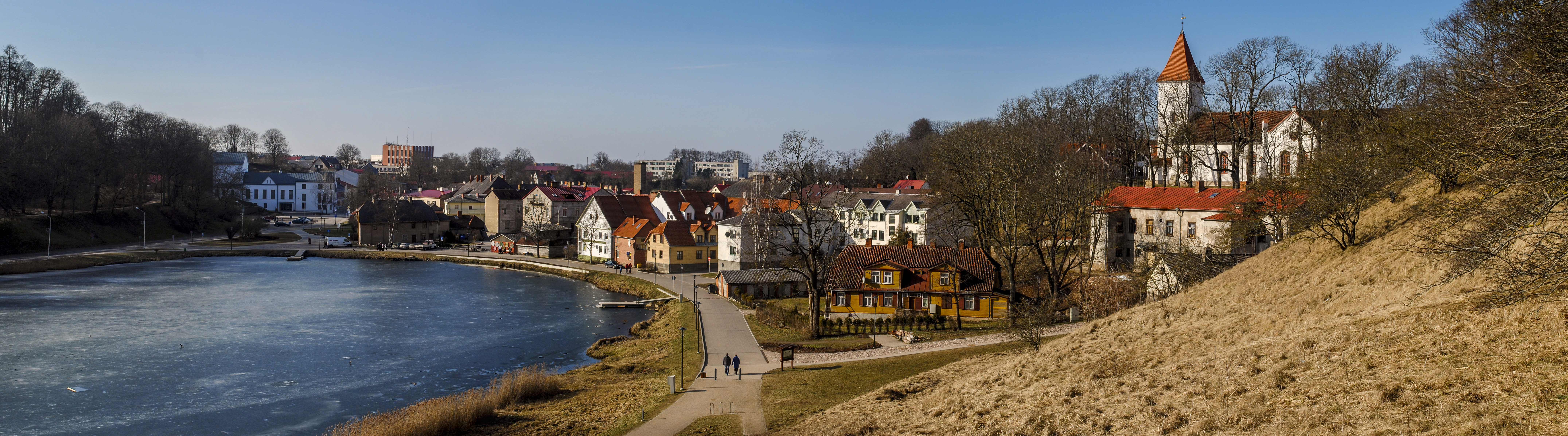 Skats no Talsu pilskalna uz senpilsētu, Talsi